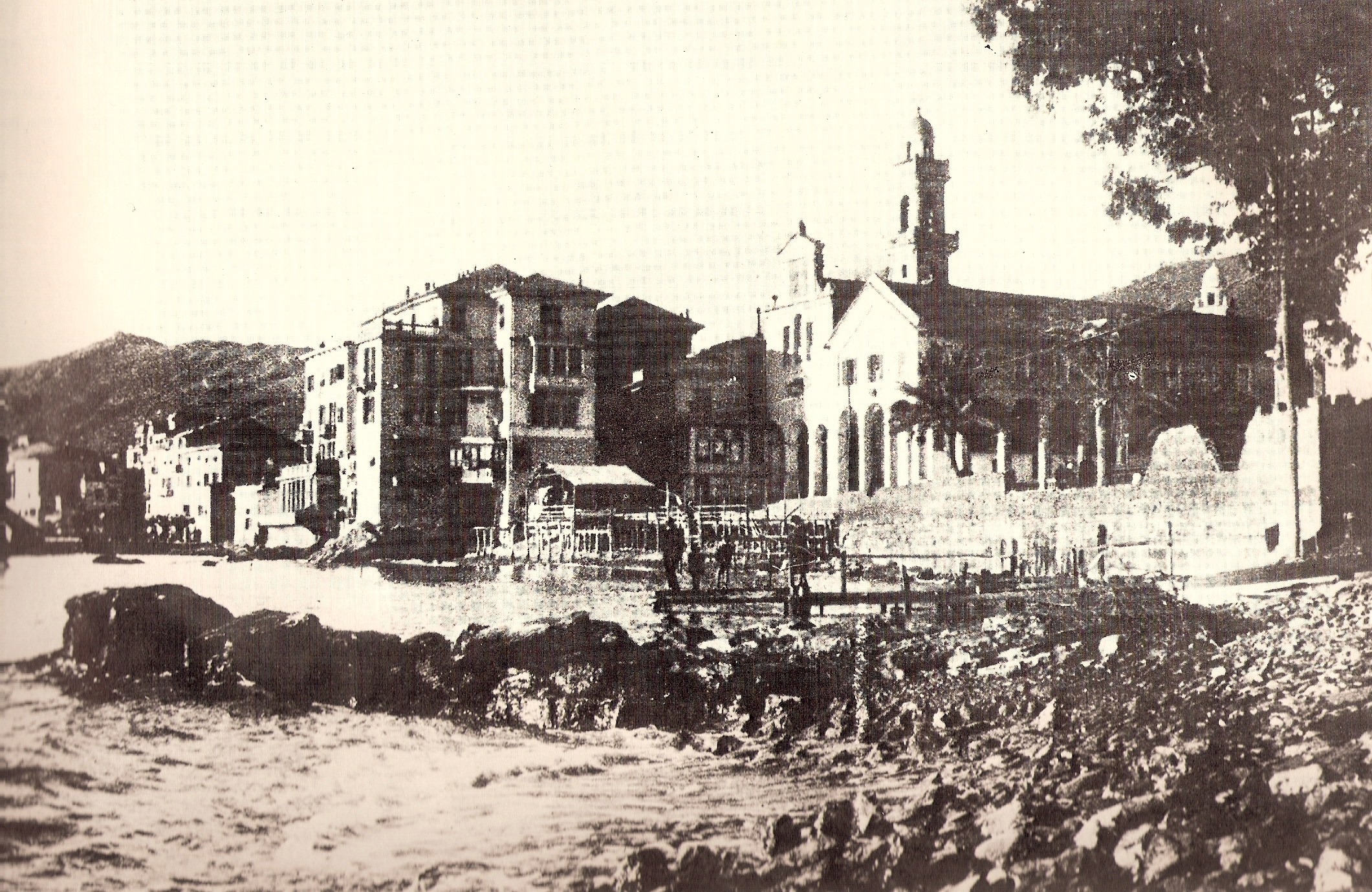 Il complesso monastico delle Clarisse dopo i lavori del 1908, Rapallo, Liguria, Italia